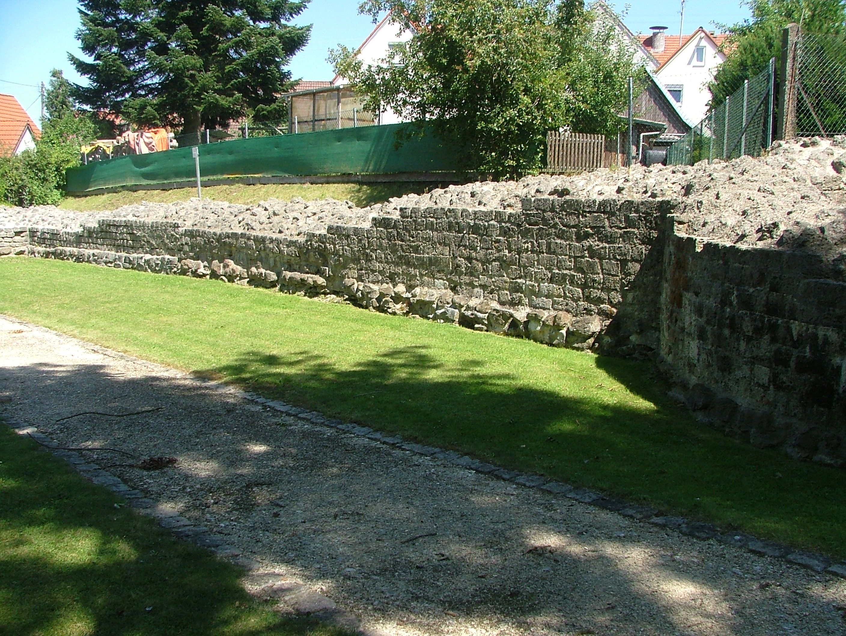 Caelius mons